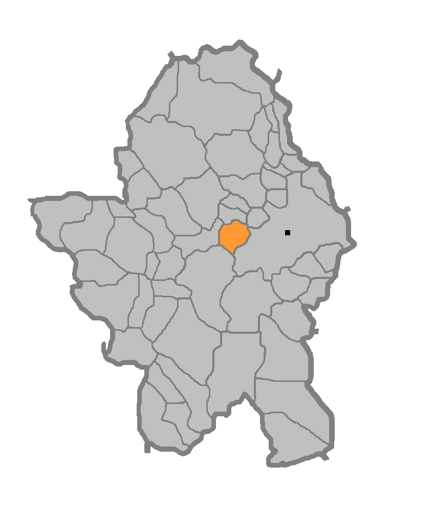 Мјесна заједница Доња Кола